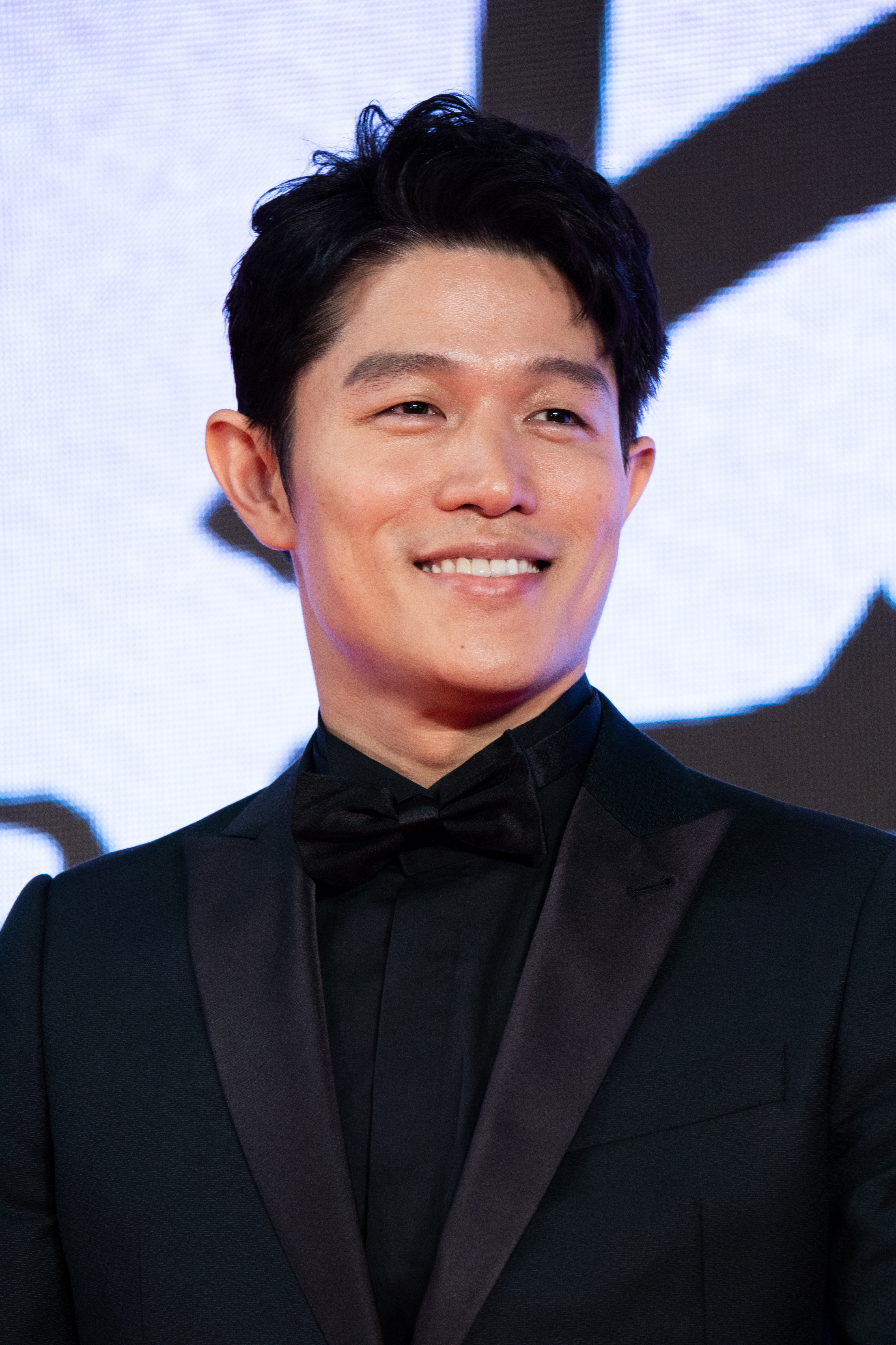 第32回 東京国際映画祭 オープニングセレモニー 鈴木亮平 (ひとよ)